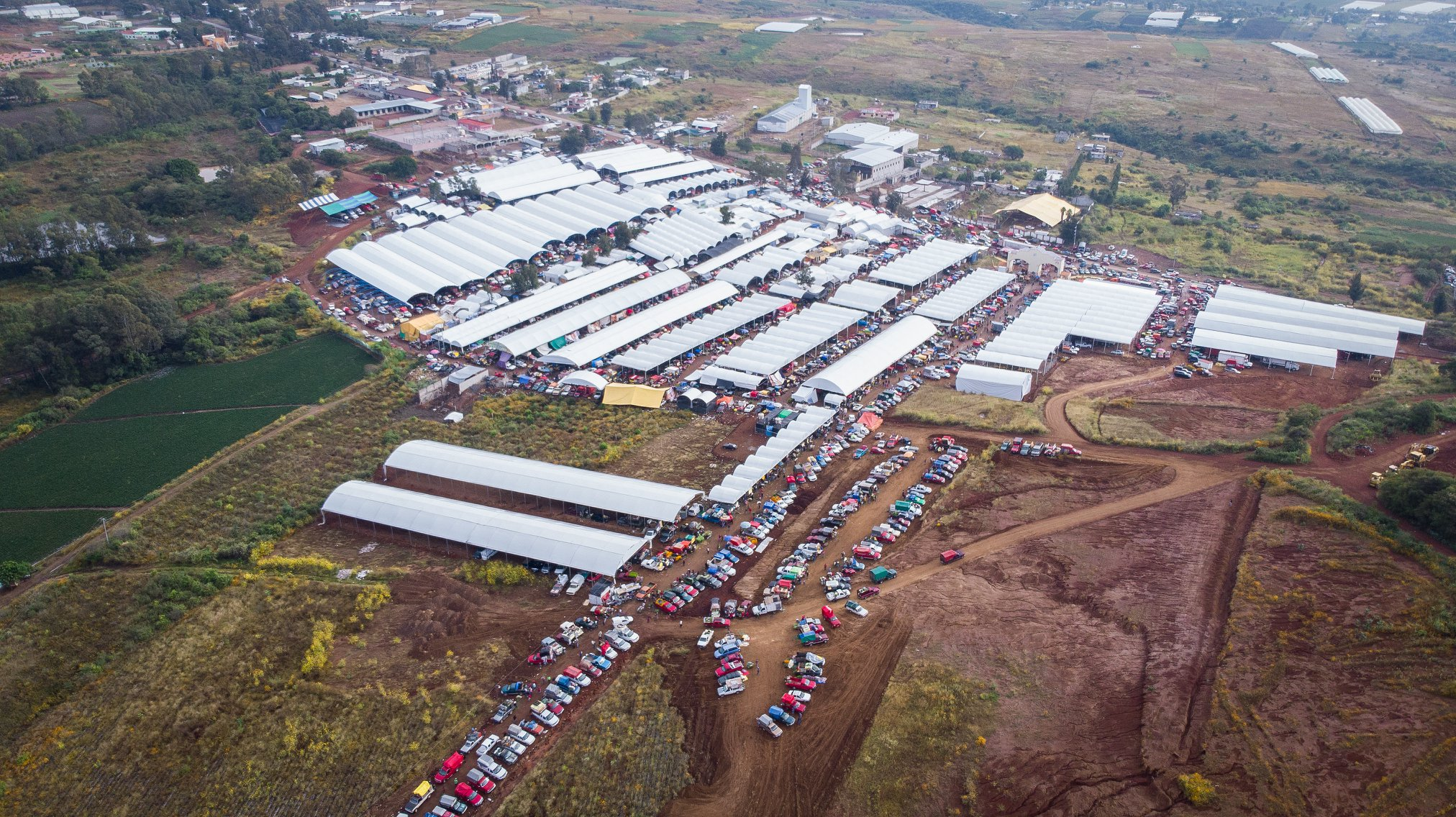 La Central de Abasto de Villa Guerrero es el principal mercado mayorista y minorista de productos de consumo en la region conocida como la Capital de la Flor en México, es especialista en flores finas, follajes, víveres, frutas, legumbres, hortalizas, animales, y carne.